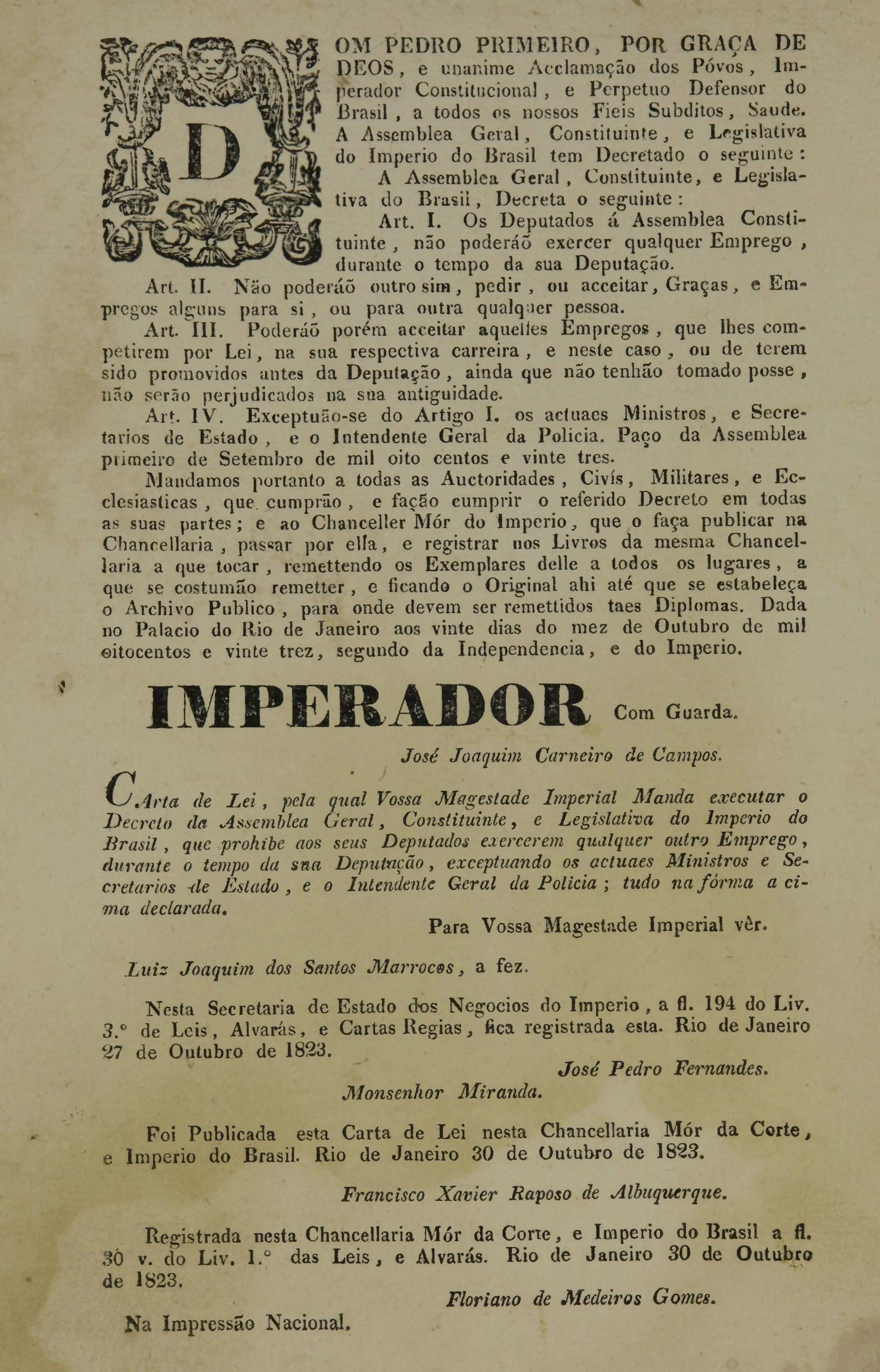 Lei criada e decretada pelo Congresso Nacional do Império do Brasil e sancionada pelo Imperador Pedro I em de 20 de outubro de 1823 pela qual proíbe que deputados tivessem outro emprego durante o mandato, salvo os permitidos em lei.